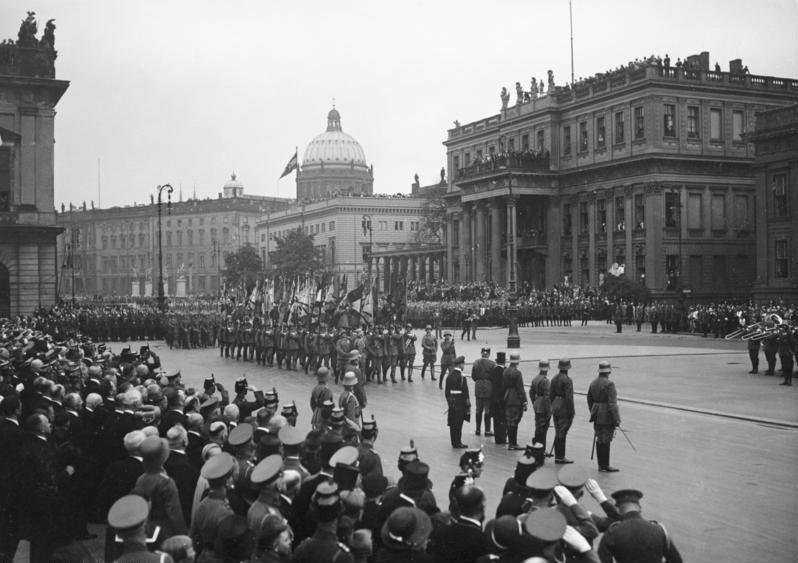 Berlin; Parade vor von Hindenburg vor dem Ehrenmal Unter den Linden 1931